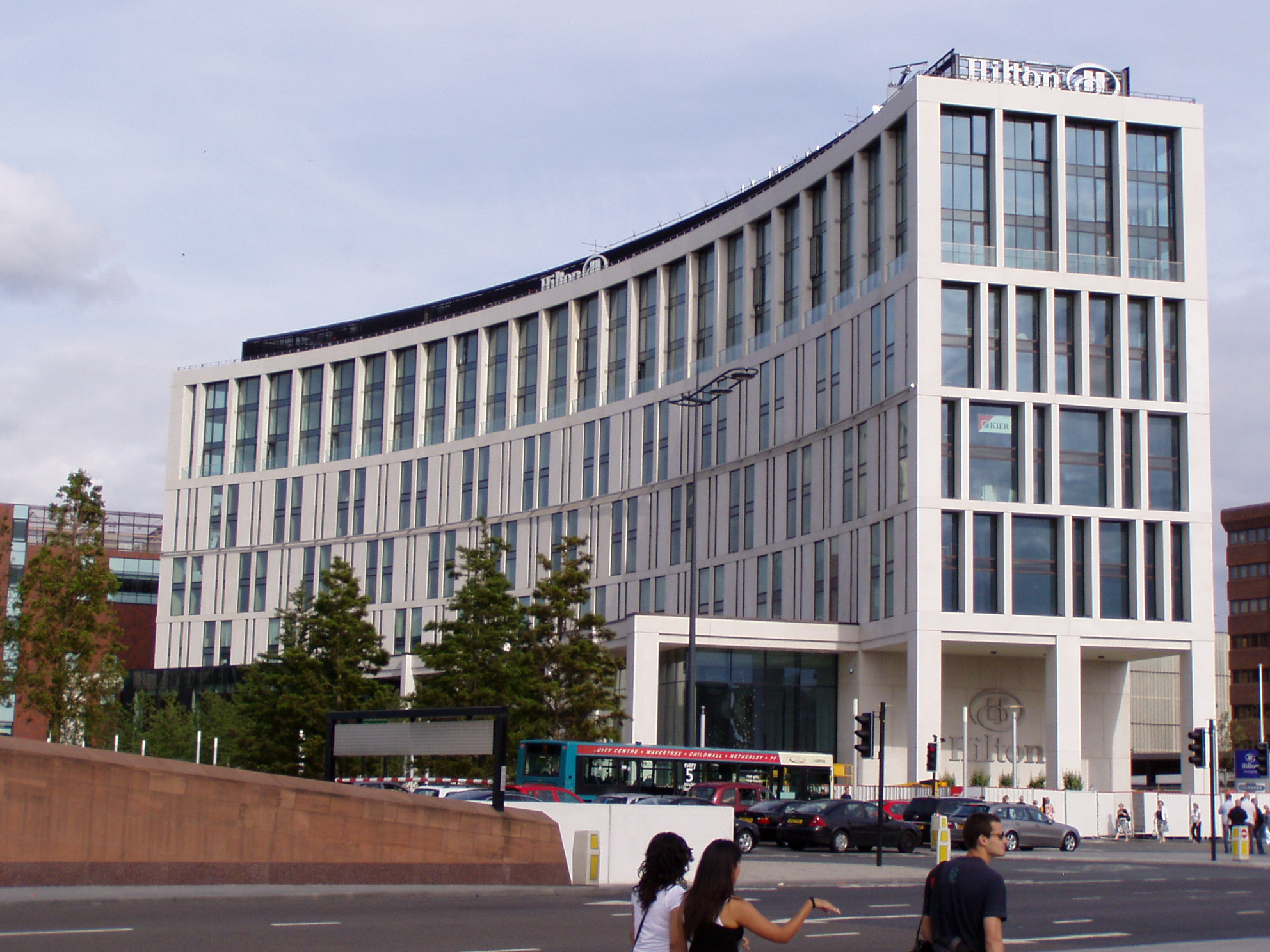 New Hilton Hotel, Liverpool